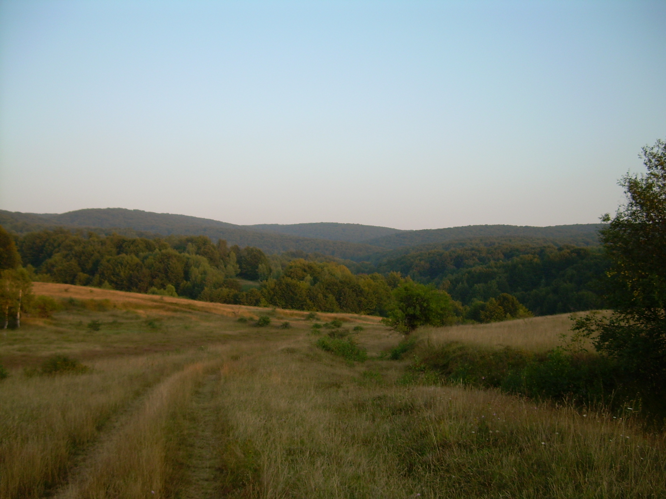 Валмиште испод Чемерника.